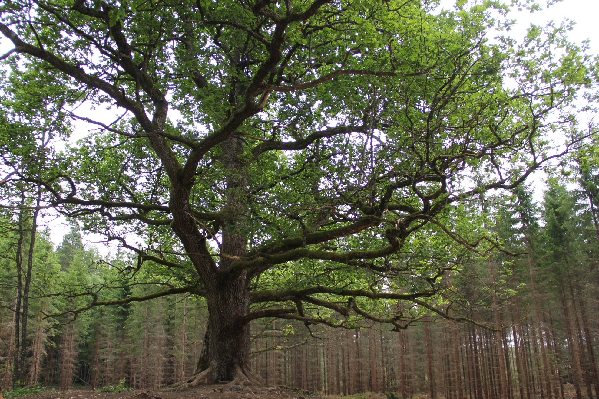 Paavolan tammi, Lohjansaari, Lohja – Pysäköintipaikka on osoitteessa Pietiläntie 23.